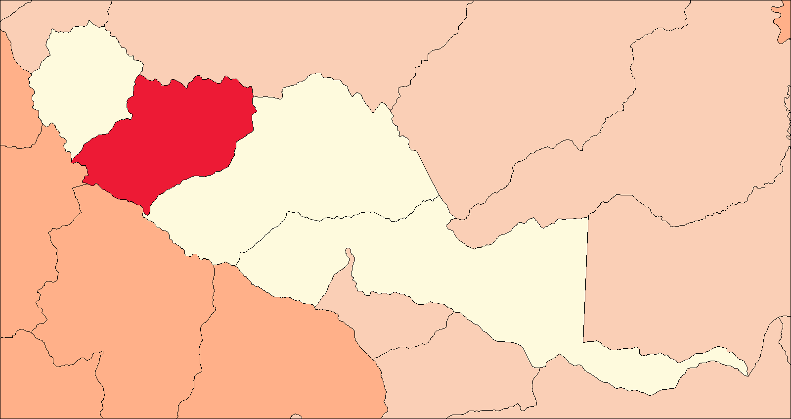 Área del distrito de Pinra.